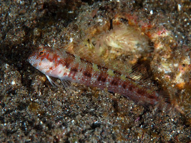 マツバギンポ Mimoblennius atrocinctus